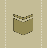 ՀՀ ԶՈՒ ավագ զինվորական կոչում